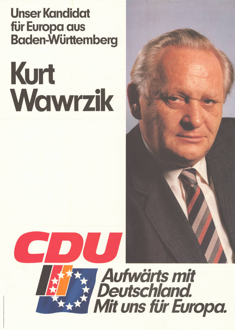 Unser Kandidat für Europa aus Baden-Württemberg Kurt Wawrzik CDU Aufwärts mit Deutschland. Mit uns für Europa. Abbildung: Porträtfoto Plakatart: Kandidaten-/Personenplakat mit Porträt Auftraggeber: CDU-Bundesgeschäftsstelle, Abt. Öffentlichkeitsarbeit, Bonn Drucker_Druckart_Druckort: Willy F.P. Fehling GmbH, Hannover Objekt-Signatur: 10-030 : 155 Bestand: Europawahlplakate (10-030) GliederungBestand10-18: Europawahlplakate (10-030) » Europawahl am 17.6.1984 » CDU Lizenz: KAS/ACDP 10-030 : 155 CC-BY-SA 3.0 DE